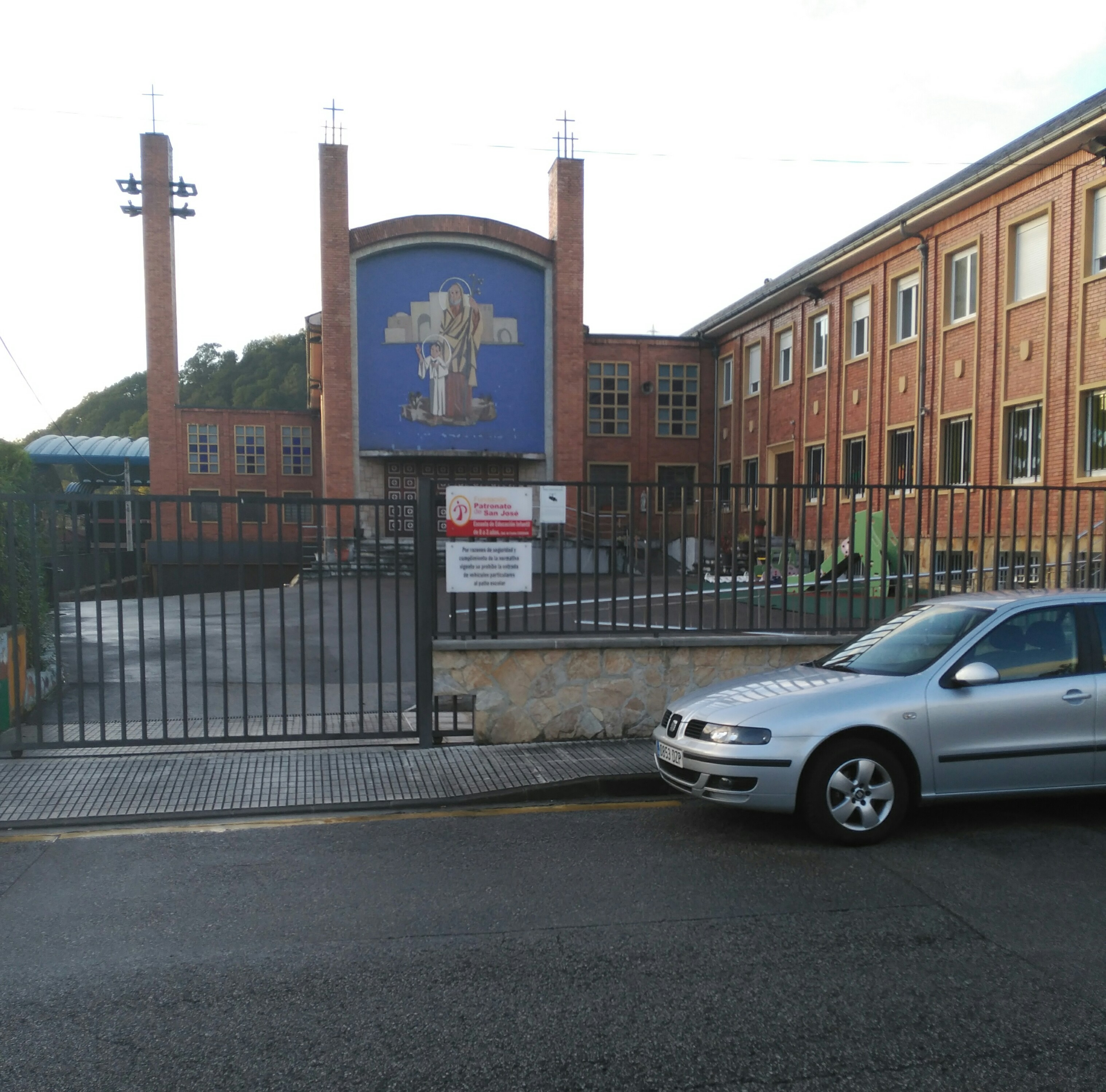 Capilla del Patronato de San José (La Felguera, Asturias)